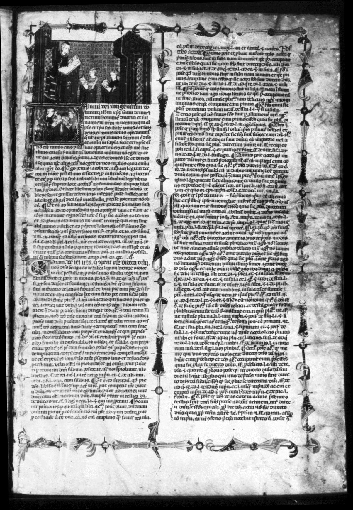 Fotogramma 4